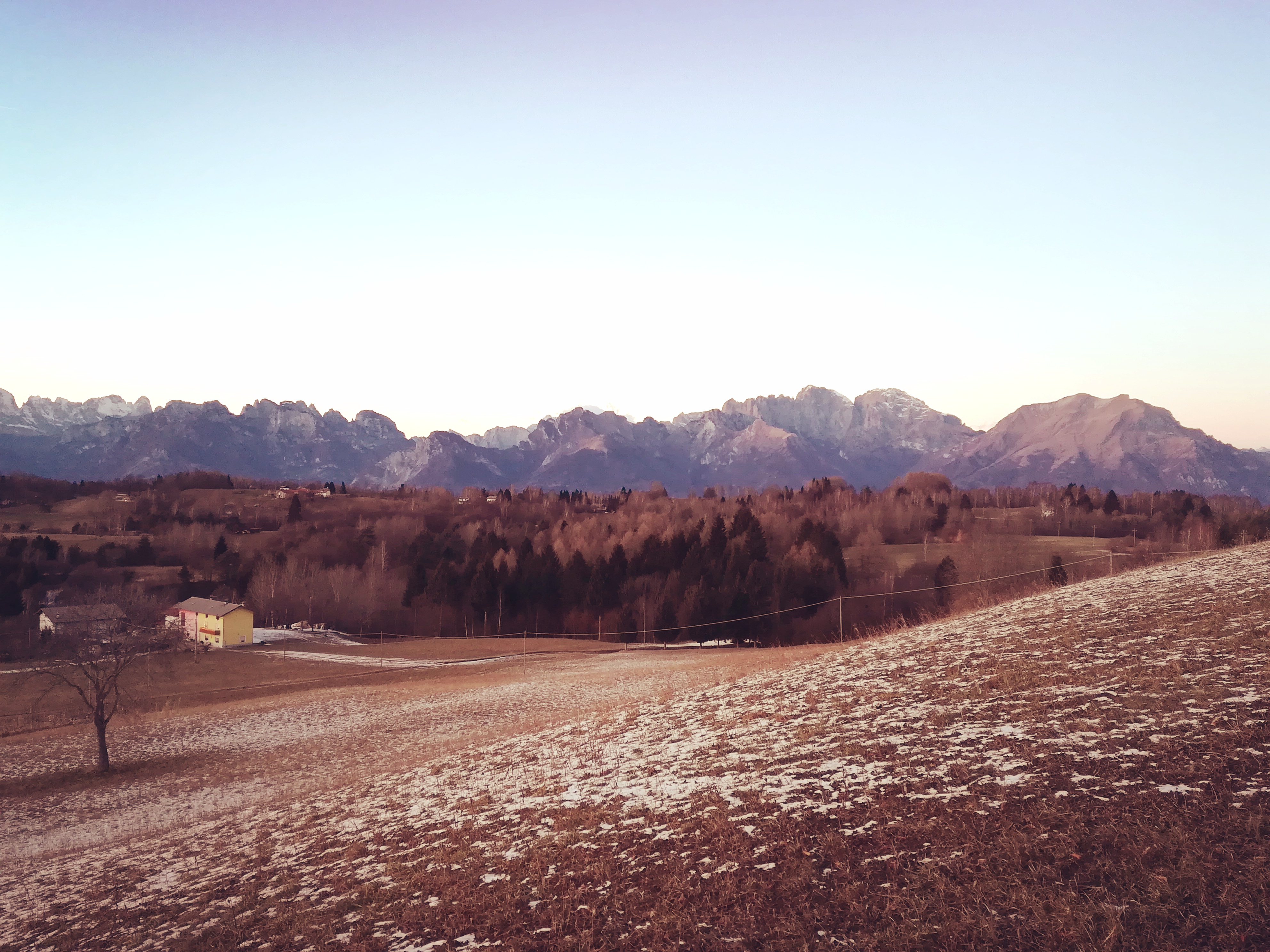 Altopiano della Valpiana, sulle Prealpi Bellunesi in comune di Limana, Belluno.